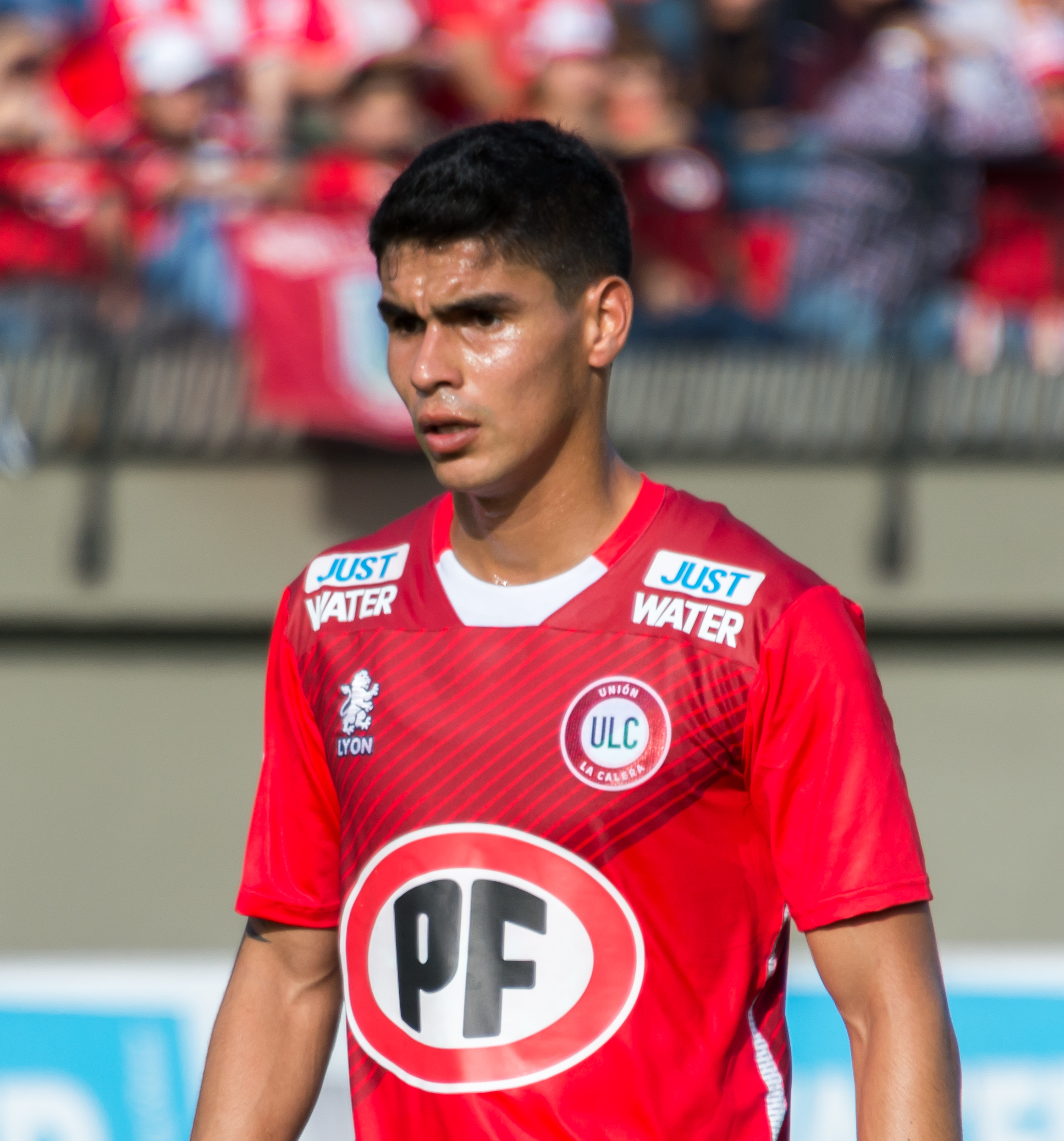 Erick Wiemberg, Unión La Calera v Colo-Colo, Estadio Municipal Nicolás Chahúan Nazar, La Calera, Región de Valparaíso, Chile.